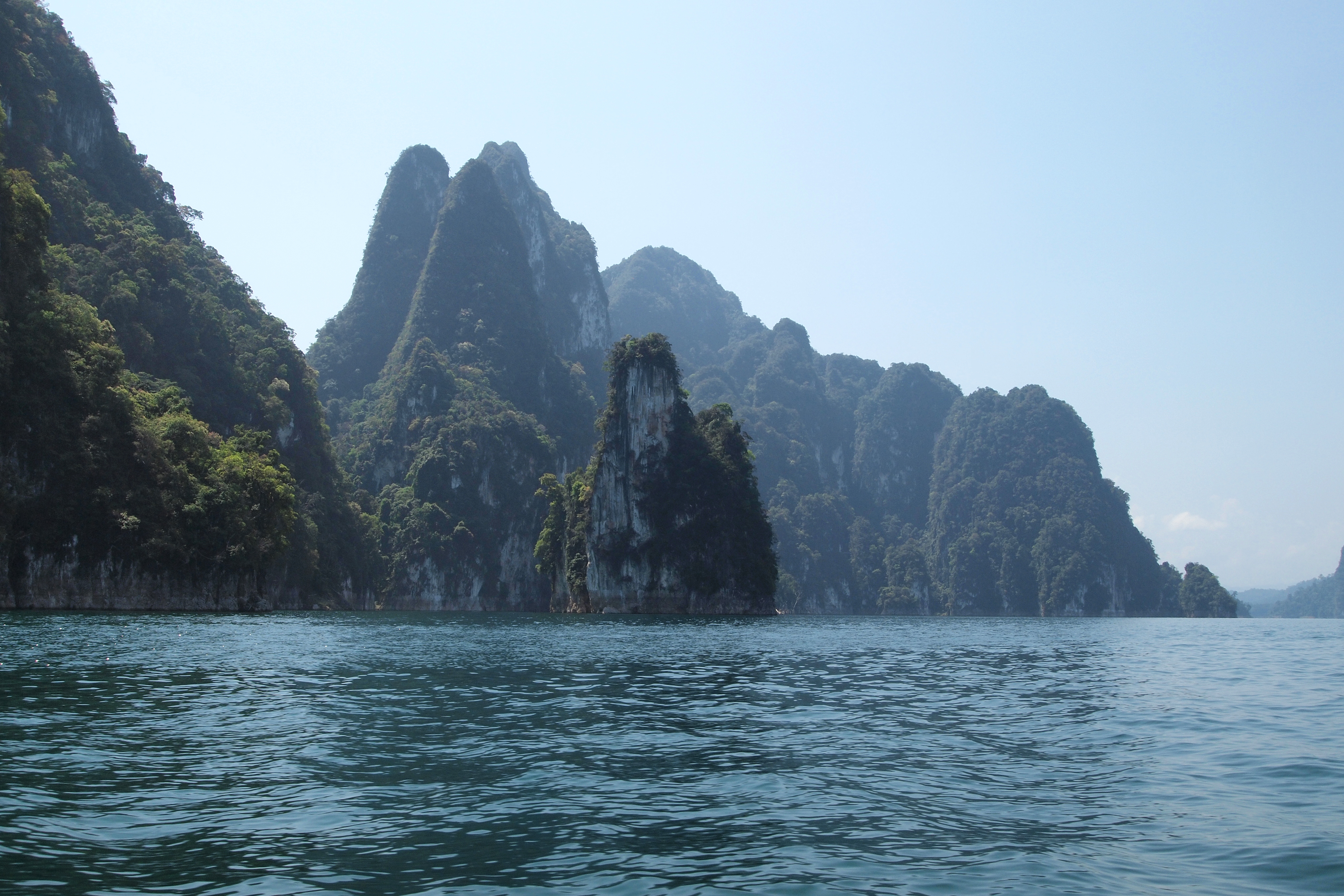 อุทยานแห่งชาติเขาสก